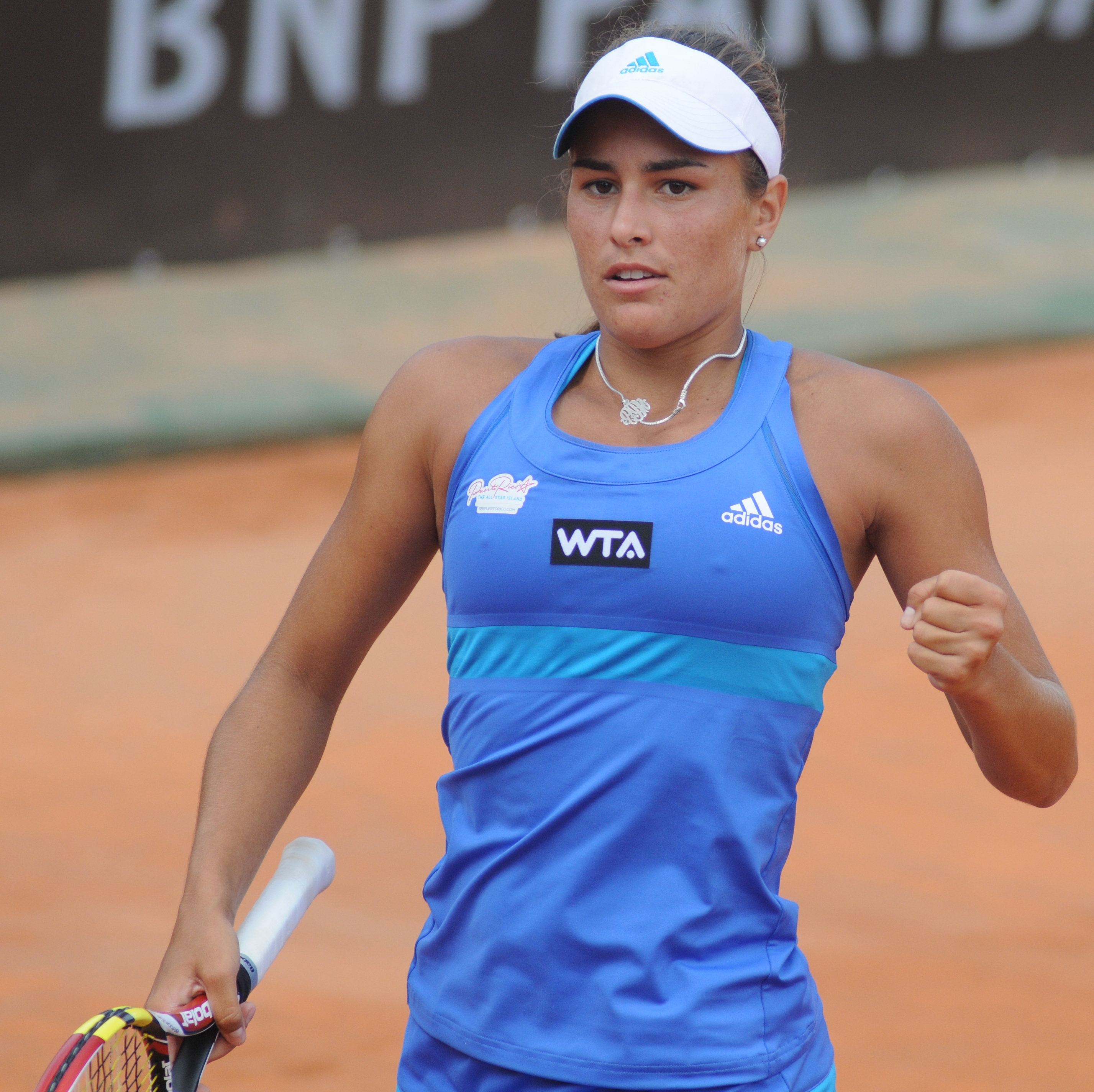 Mónica Puig at the 2014 Internazionali BNL d'Italia